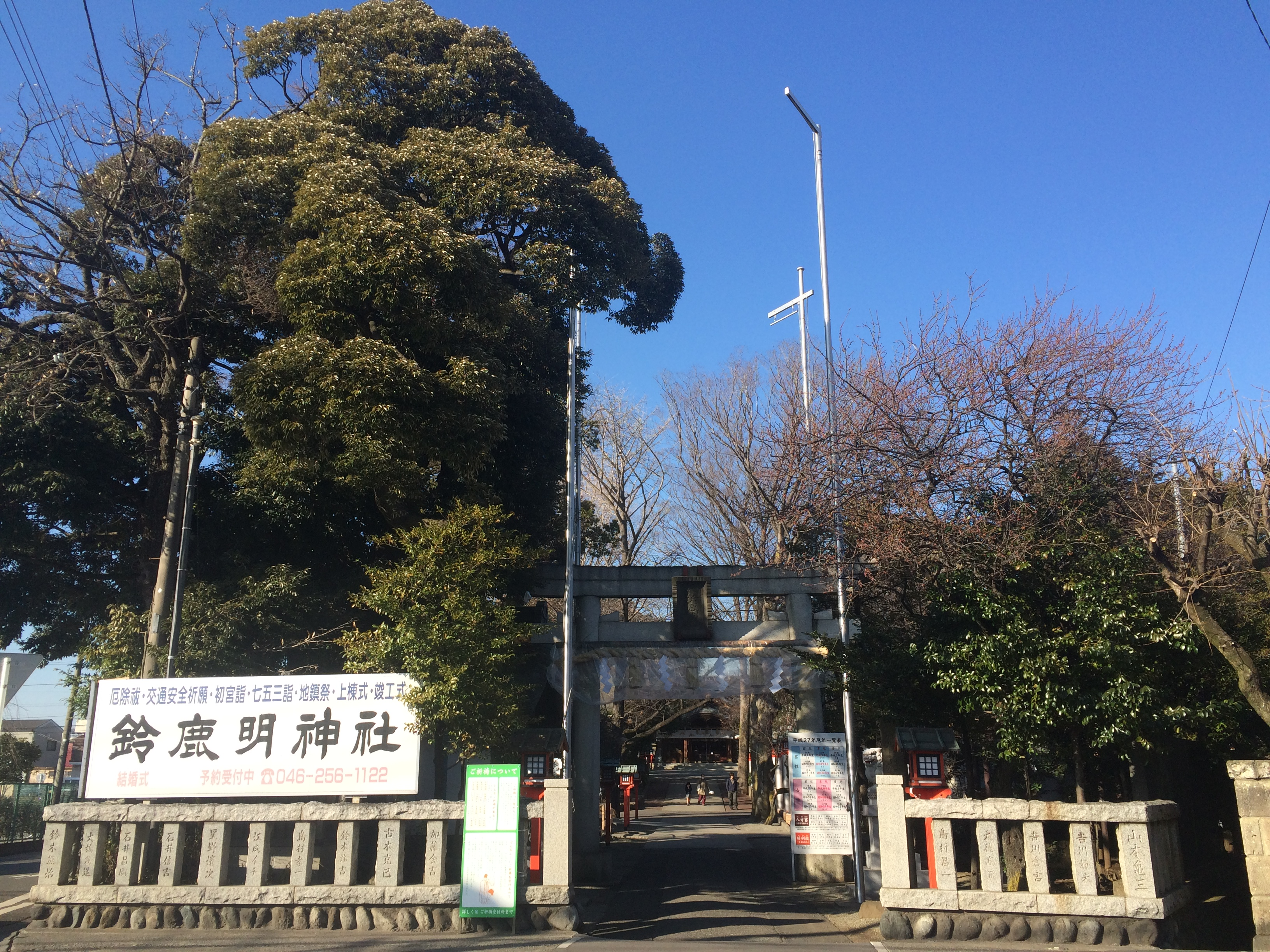 神奈川県座間市に鎮座する鈴鹿明神社の境内入口。